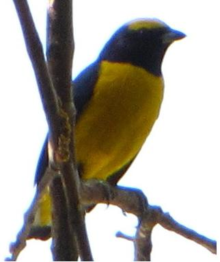 Euphonia trinitatis male Lugar / place / lieu : Cagua, Estado Aragua, Venezuela.